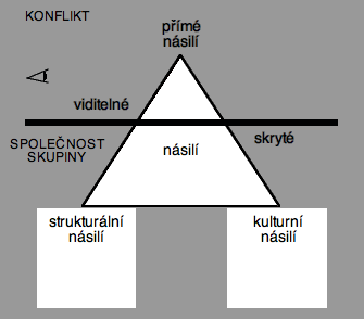 Pyramida násilí, podle poznámek z přednášky Johana Galtunga v Curychu, podzim 2002